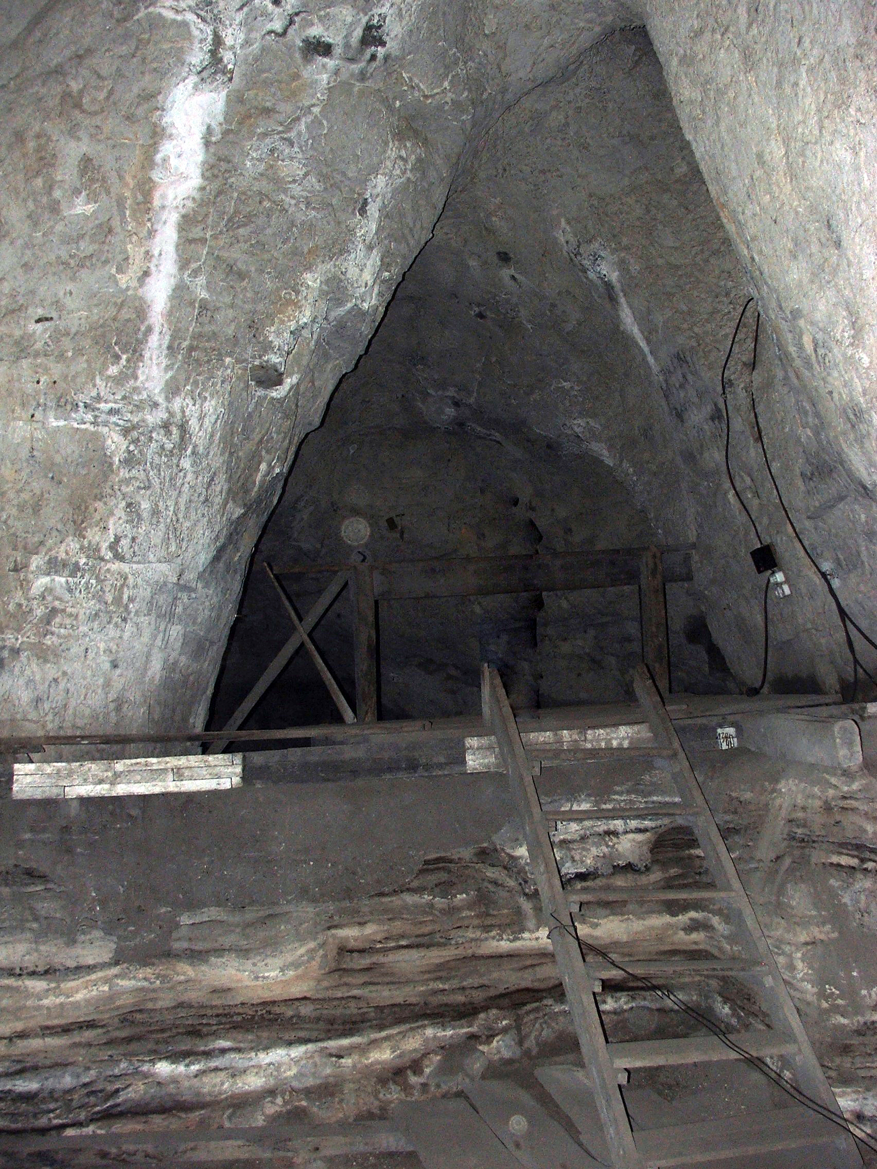 Денисова пещера: Солонешенский район, Алтайский край This image is related to the protected area of Russia number 2210161